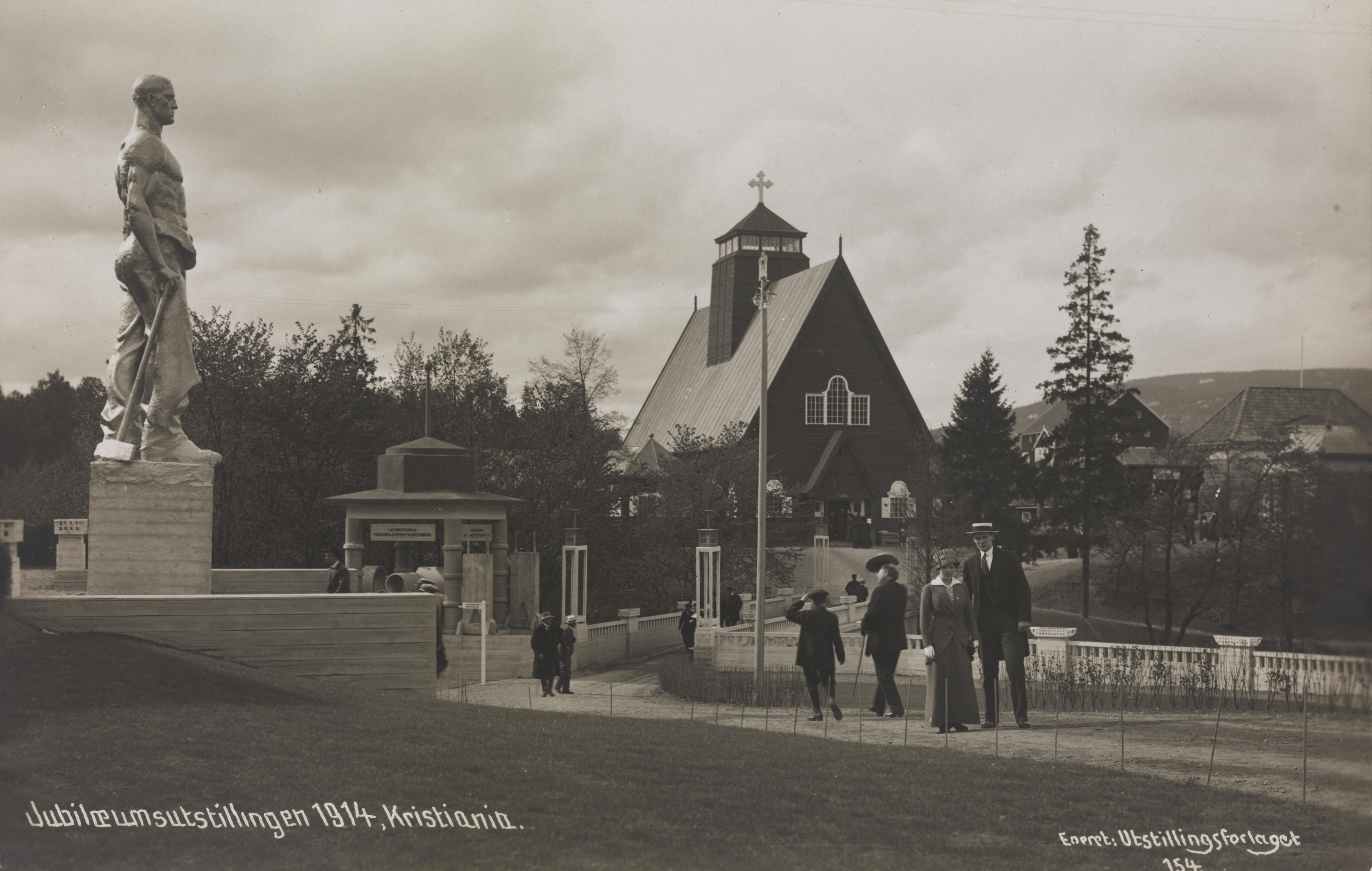 Bildet er hentet fra Nasjonalbibliotekets bildesamling Frognerparken, Oslo, Oslo